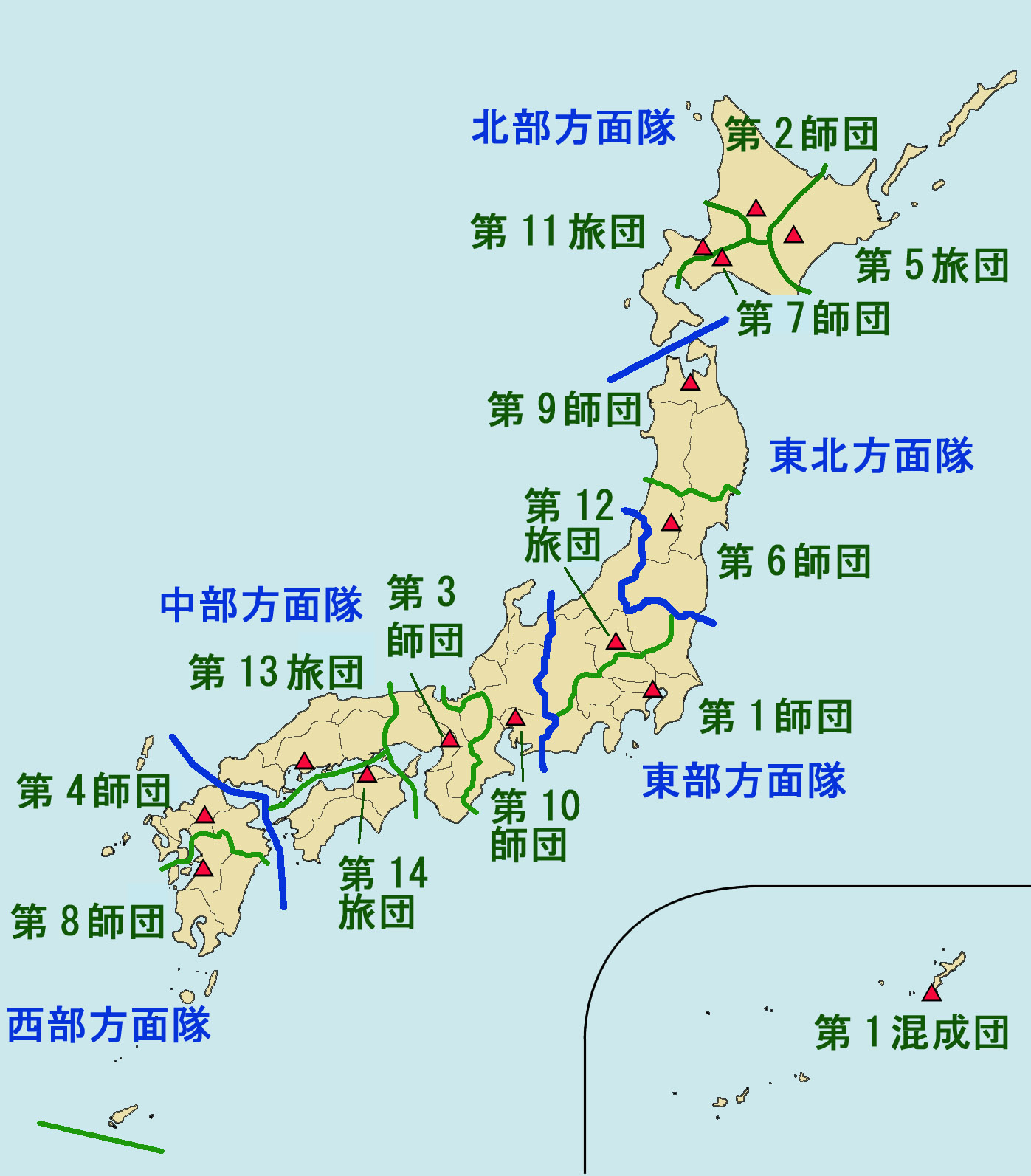 JGSDF divisions 陸上自衛隊・師団配置